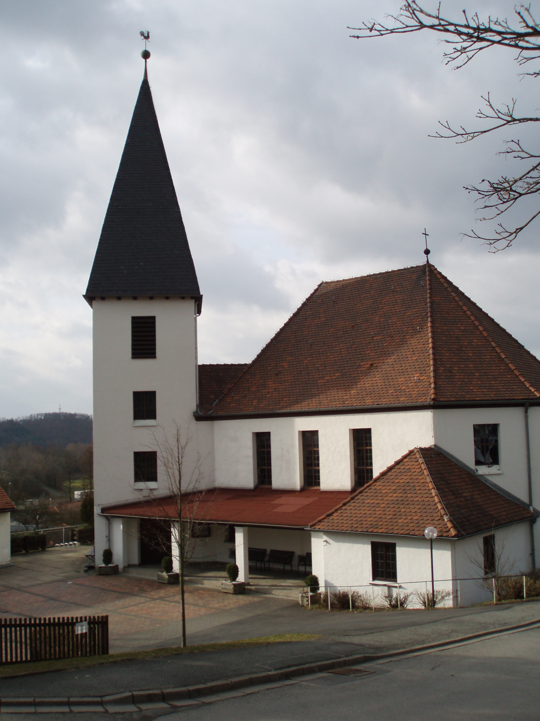 Fotoaktion Creidlitz 22. März 2009, Bild 15 (original p3220015.jpg)